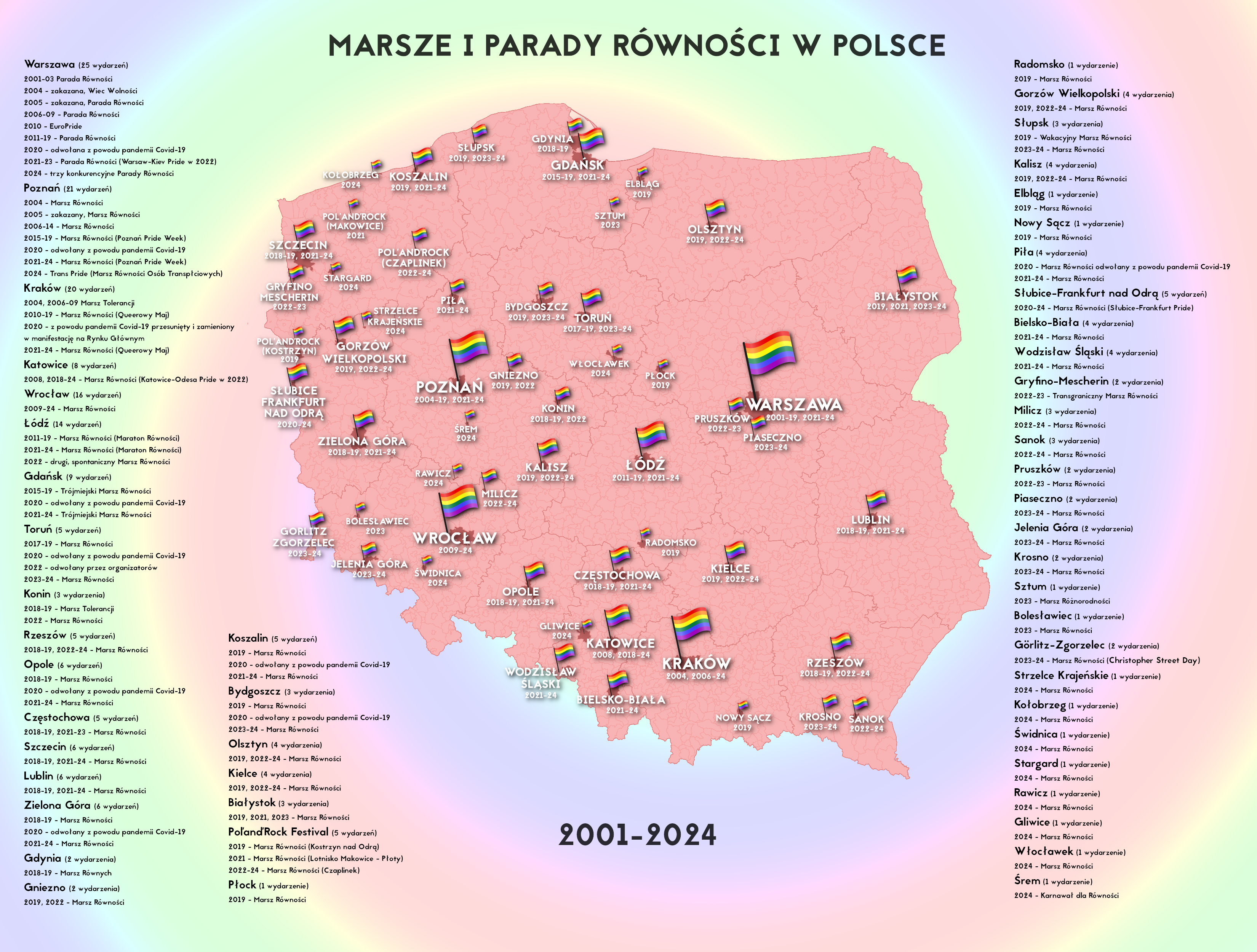 Mapa marszy i parad równości w Polsce